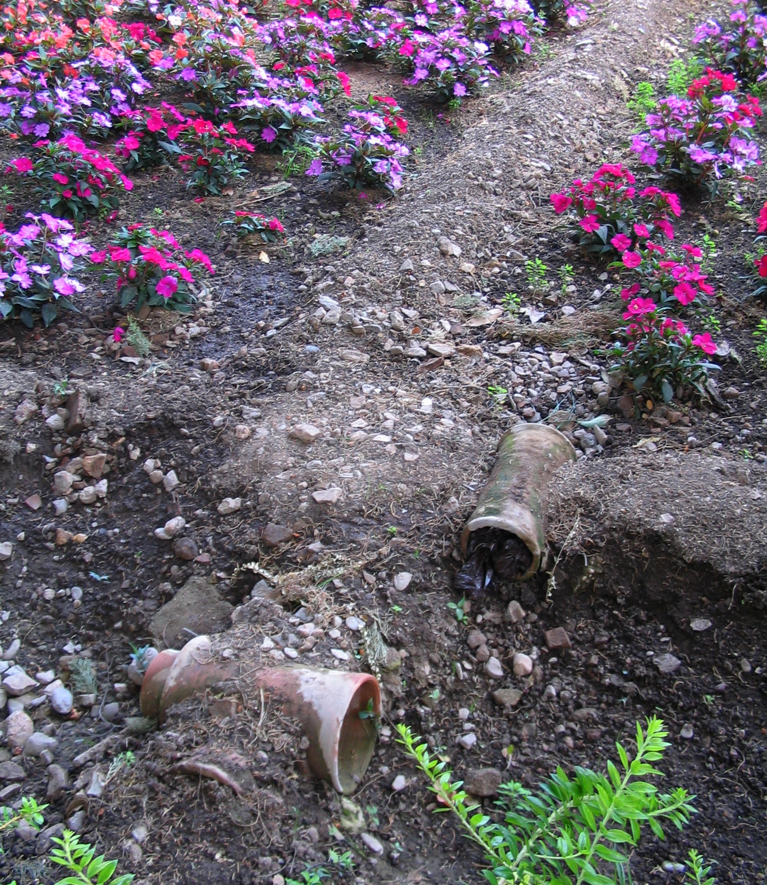 canaux d’irrigation des parterres, Alhambra de Grenade Espagne.